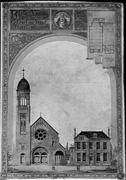 ontwerp van de Heilige Hart van Jezuskerk in Heer Hugowaard door C.P.W. Dessing (1844-1913)